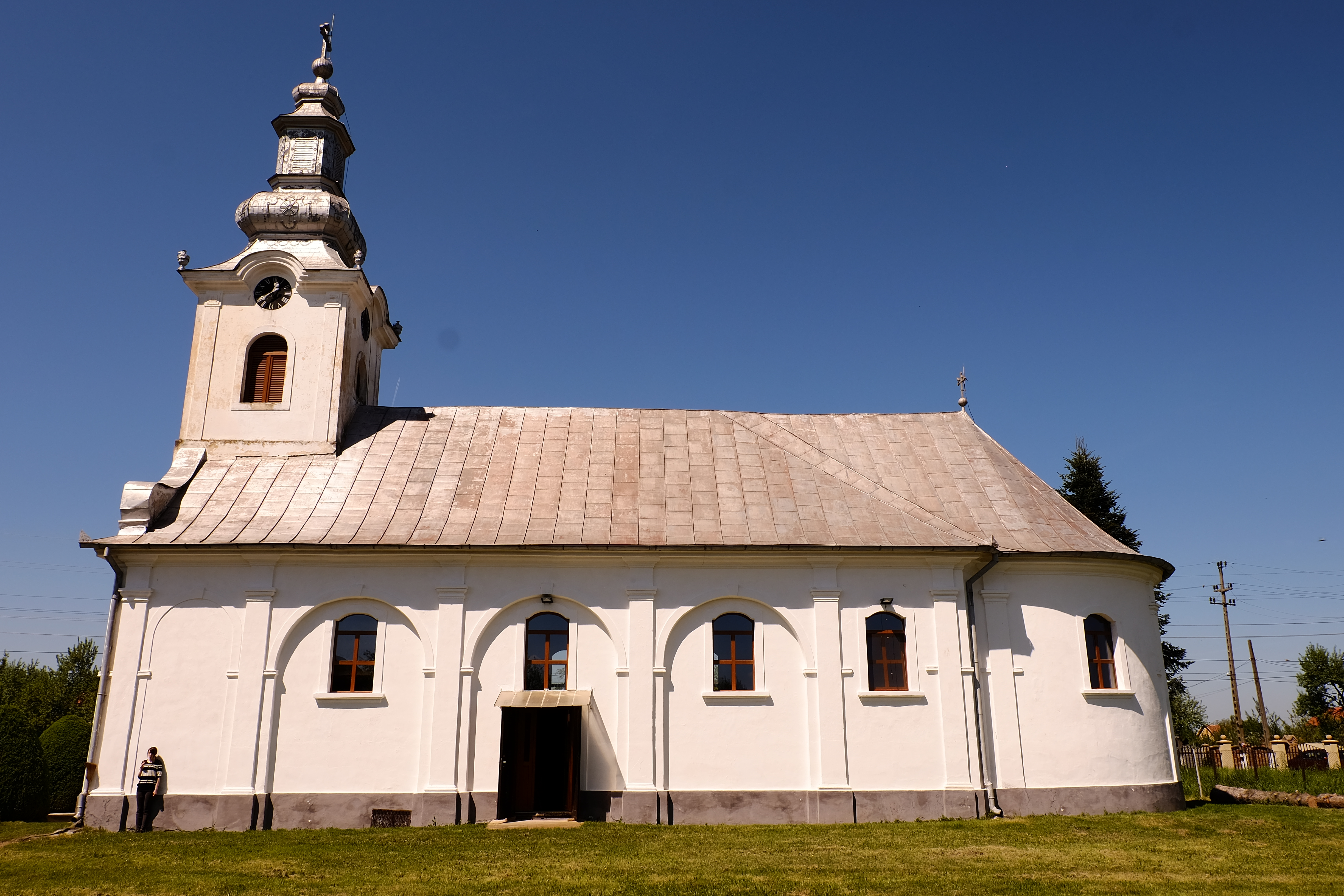 Biserica „Nașterea Maicii Domnului”